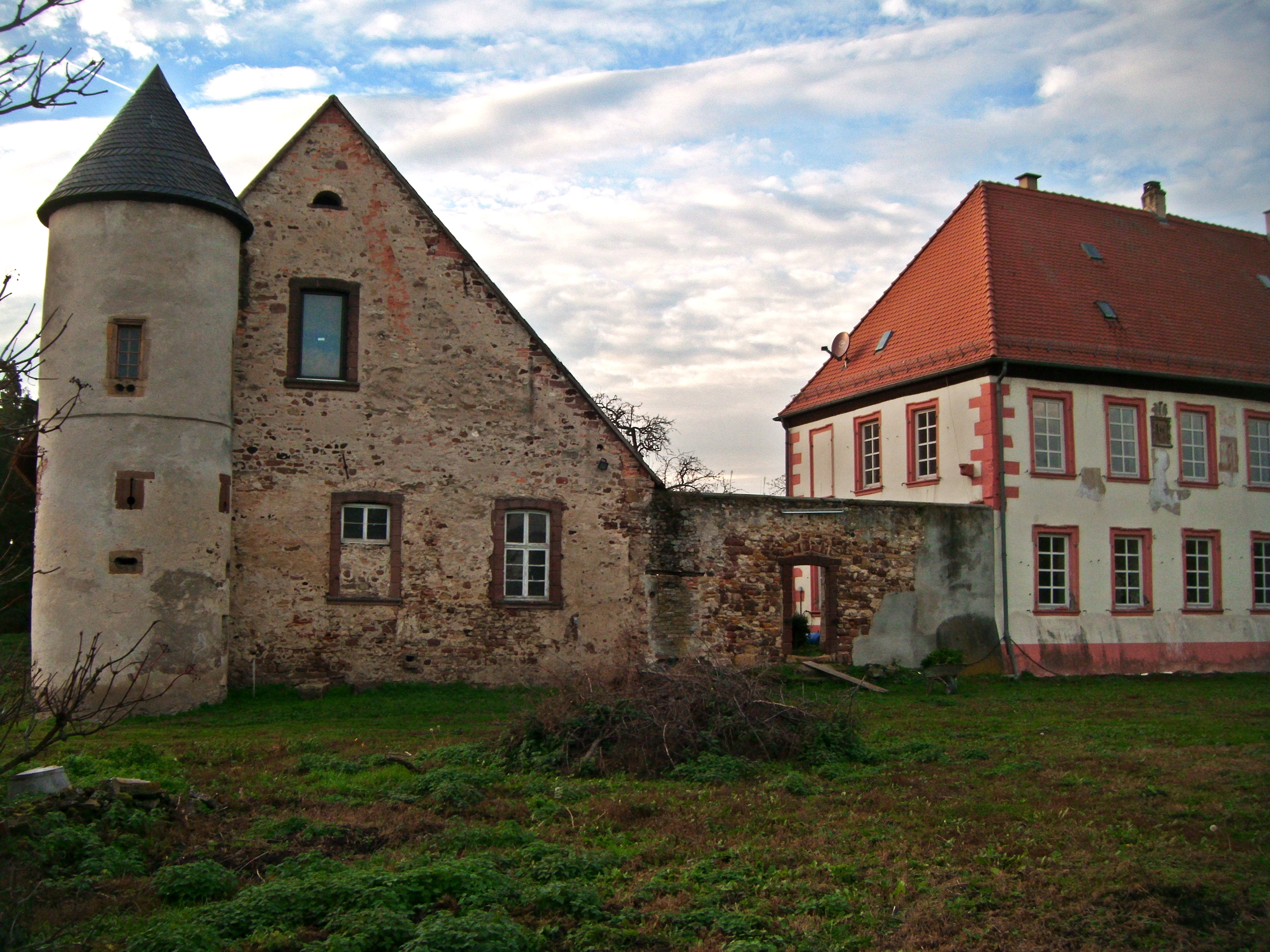 Dirmstein, Bischöfliches Schloss, Amtshaus und Diebsturm, von Osten aufgenommen